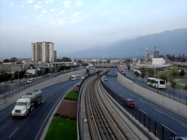 Vista del Metro y de Avenida Américo Vespucio con Vicuña Mackenna en La Florida, Santiago de Chile